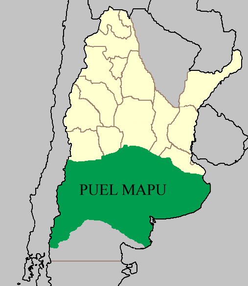 Mapa de Puel Mapu, siglos XVII-XVIII. Sudamérica. Fuentes: José Quidel y Víctor Caniullan (2002), Las identidades territoriales. Bases y Fundamentos desde una perspectiva del conocimiento Mapunche, citado en La reforma agraria y las tierras mapuches: Chile 1962-1975 (2005) de Martín Correa, Raúl Molina Otárola y Nancy Yáñez Fuenzalida, Santiago, LOM Ediciones, ISBN 9562827097, página 18. Comision de Trabajo Autónomo Mapuche (2003), Informe de la Comisión Verdad Histórica y Nuevo Trato 2003, Volumen III, Tomo II, Capítulo II Territorio y Tierras Mapuche, "Procesos territoriales en el mapunche wajontu mapu: prehistoria y resistencia anticolonial (siglo XVI – XVIII)". Equipo Mapuche, La Conquista del Desierto: fue una guerra genocida contra Nación Mapuche en Argentina